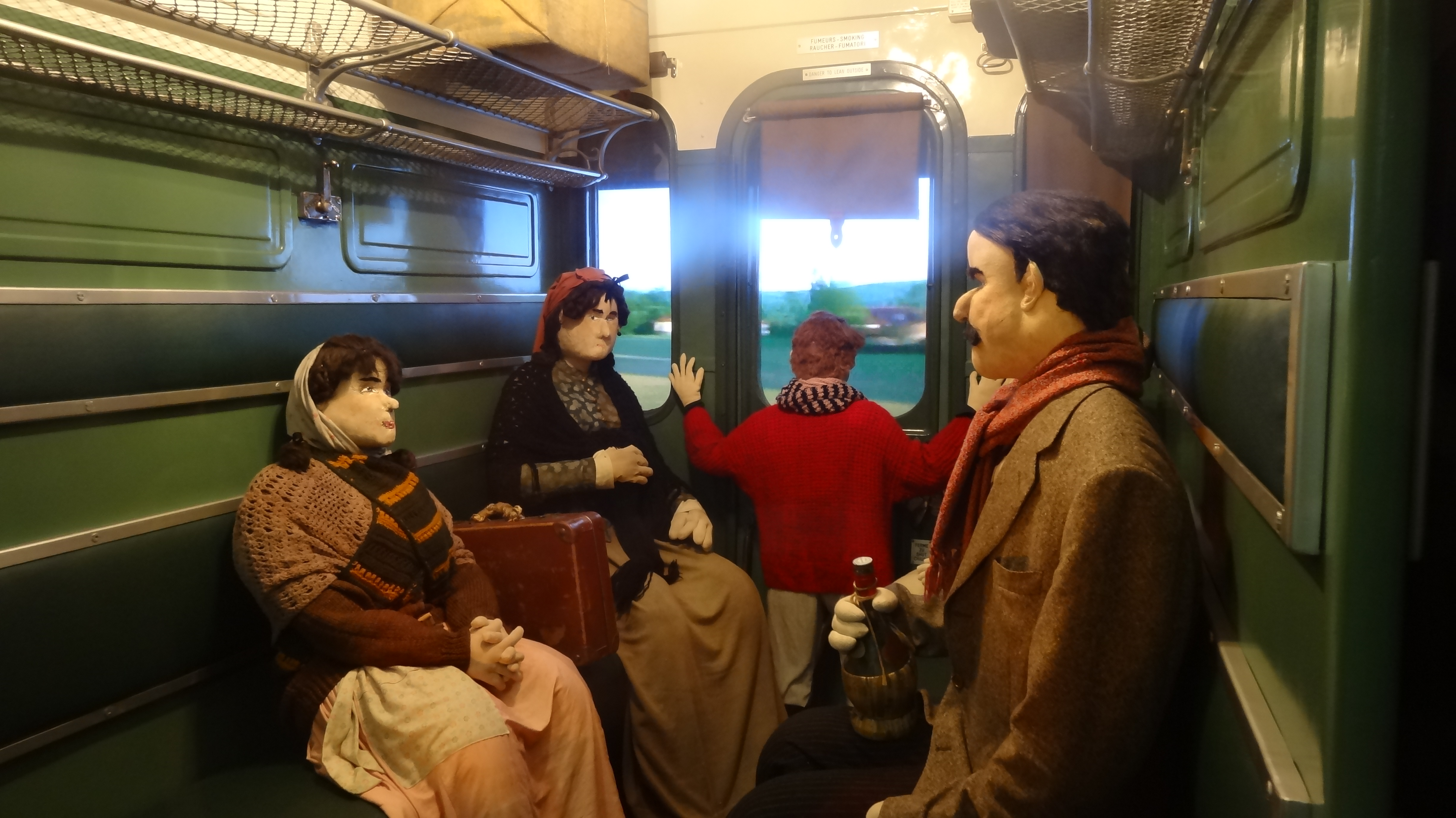 Cite du Train Mulhouse 2014 018